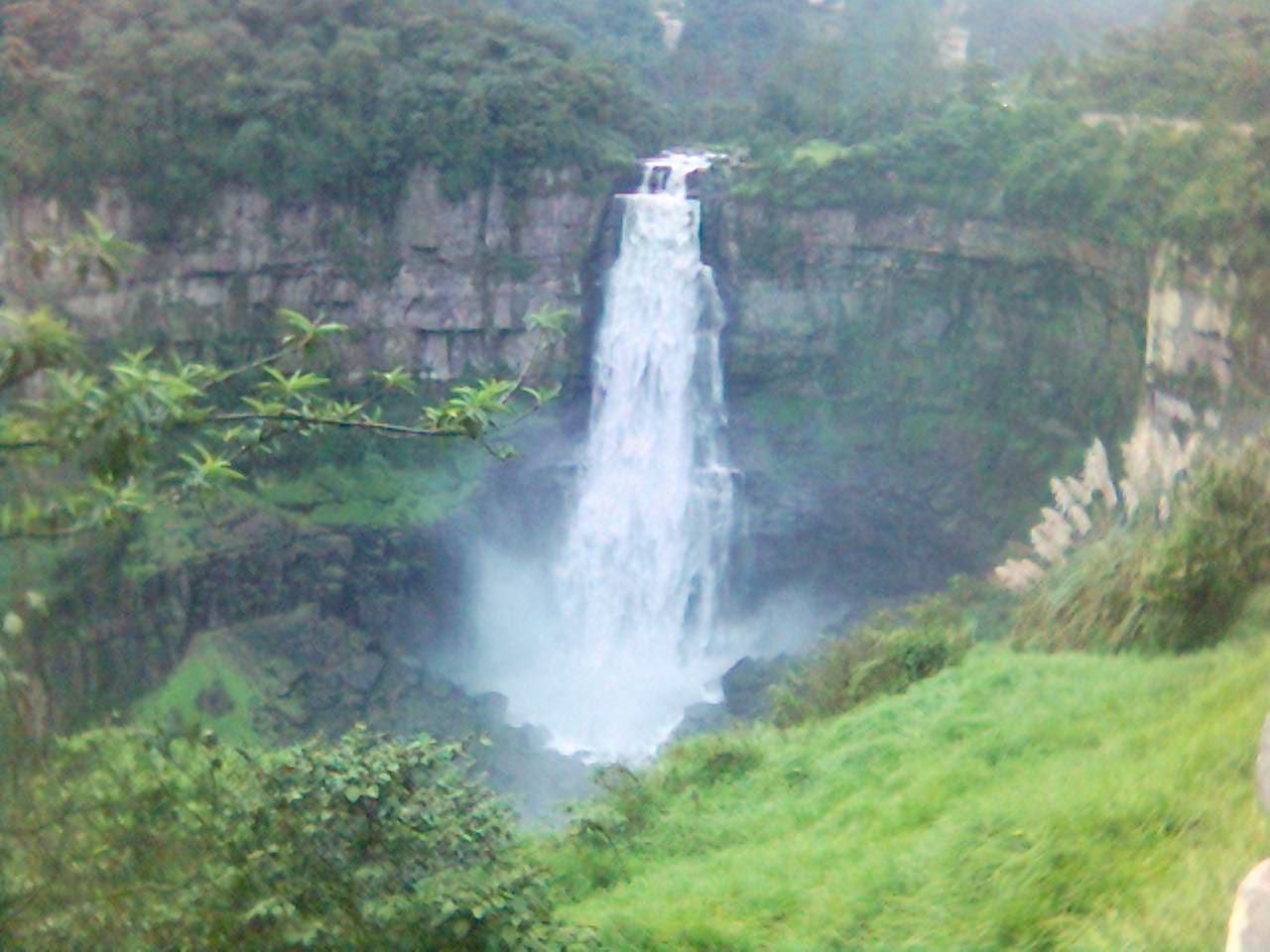 La leyenda muisca, cuenta que el gran lago de la sabana de Bogotá fue desocupado por un golpe del baston del dios Bochica en estas rocas de donde nacio el salto del tequendama y la cultura chibcha.